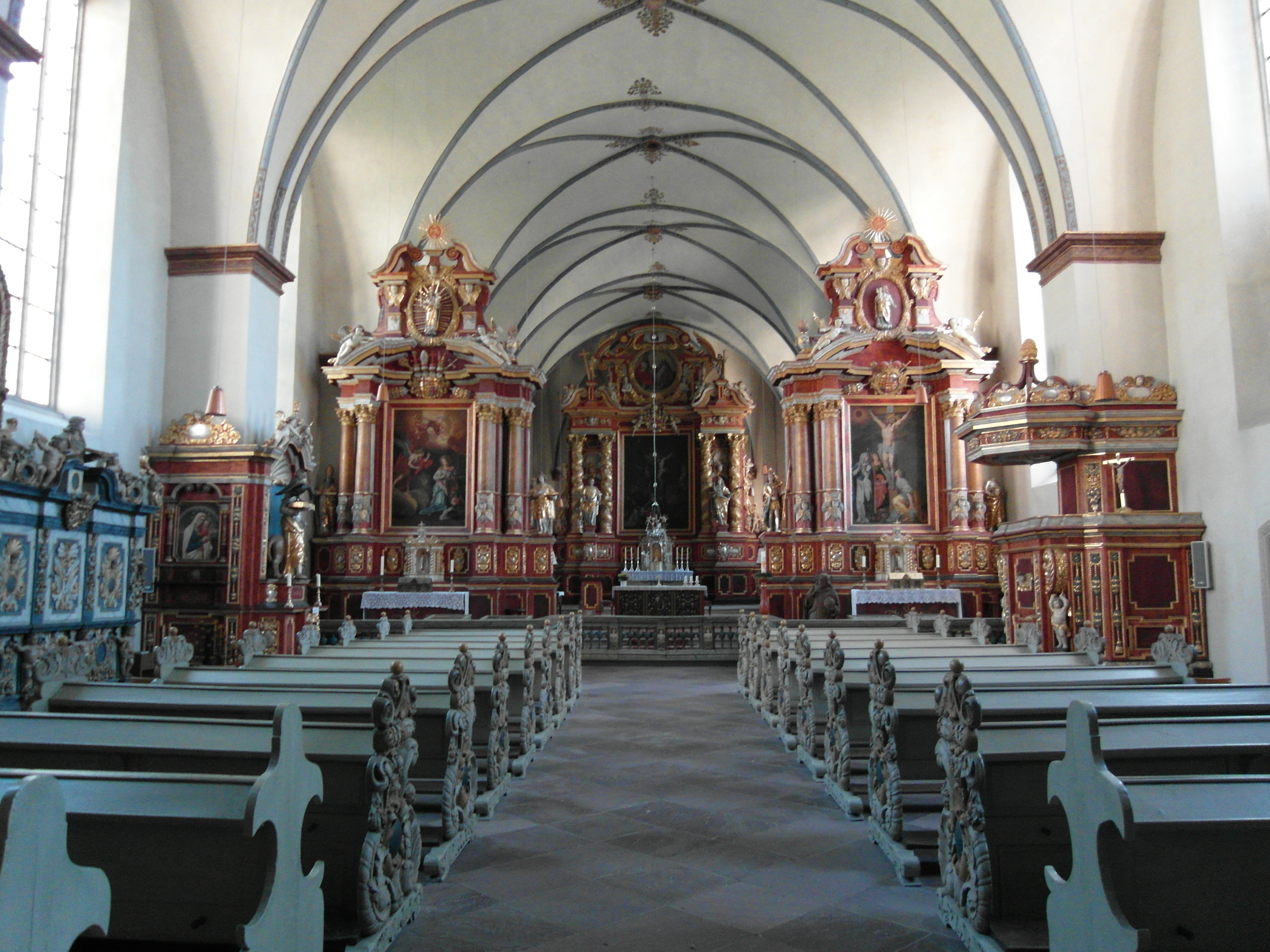 Katholische Kirche St. Stephanus und Vitus in Corvey bei Höxter This is a photograph of an architectural monument.